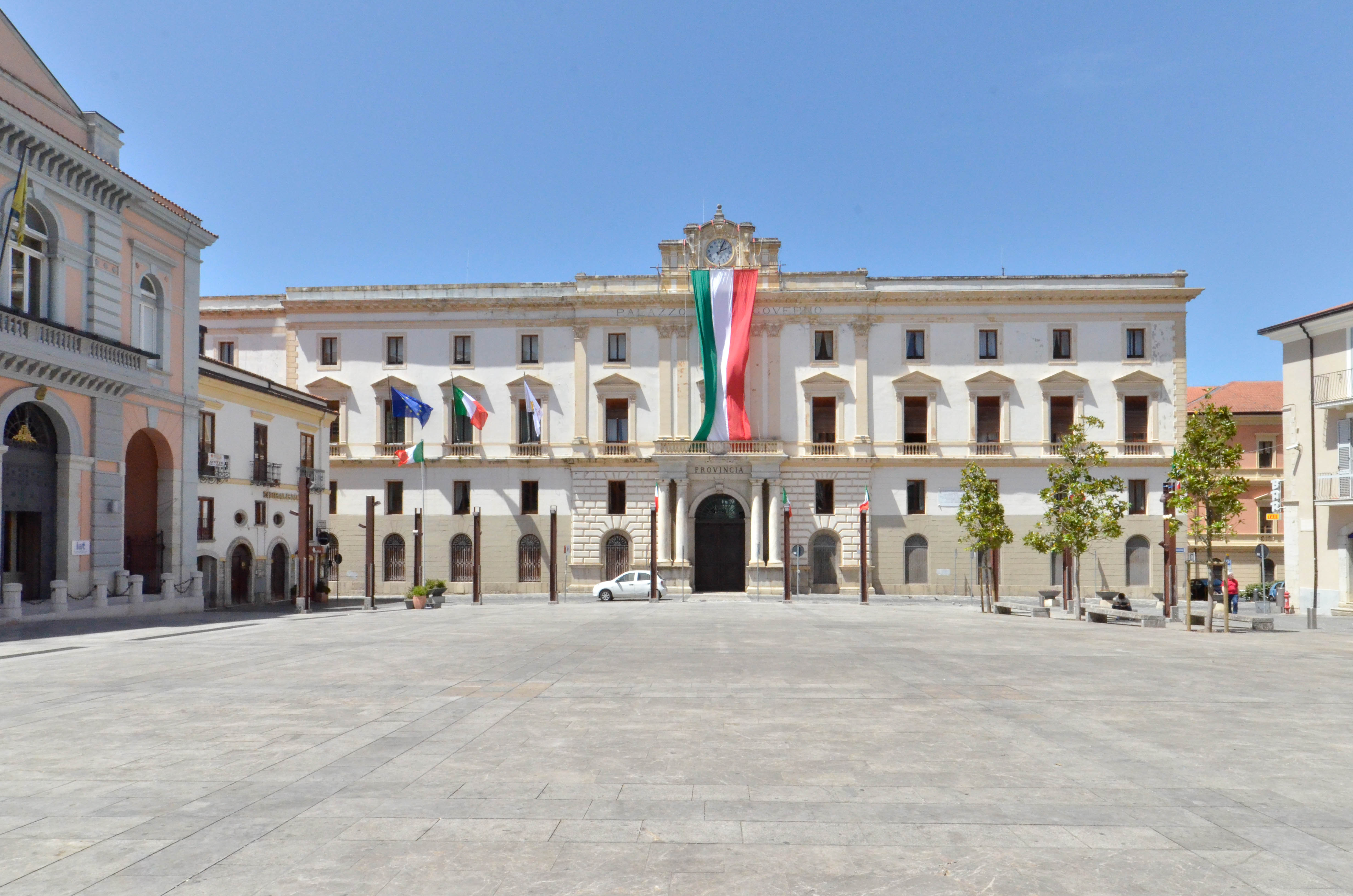 Palazzo della Provincia di Potenza This is a photo of a monument which is part of cultural heritage of Italy.